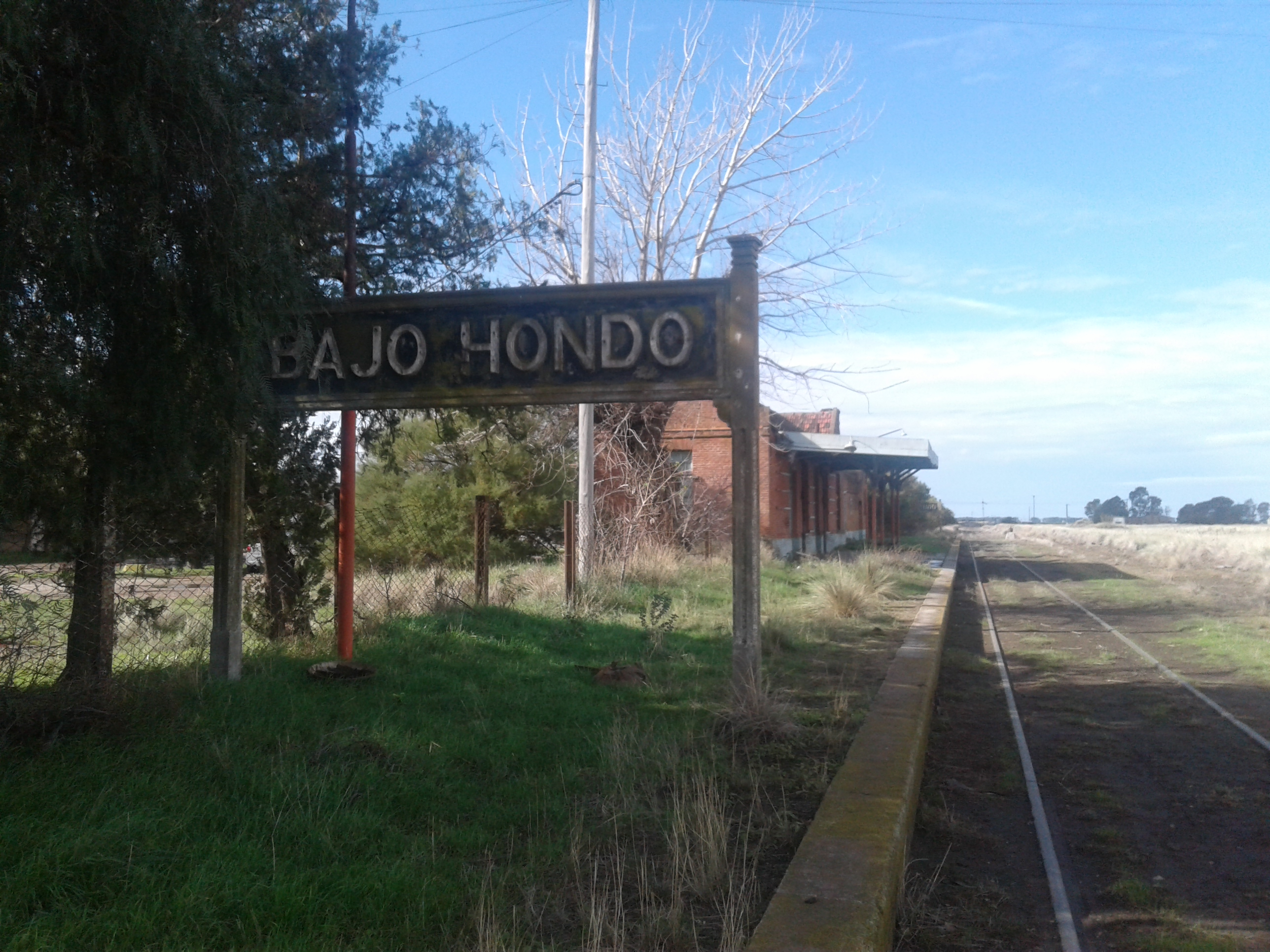 Edificio principal de la estación Bajo Hondo.